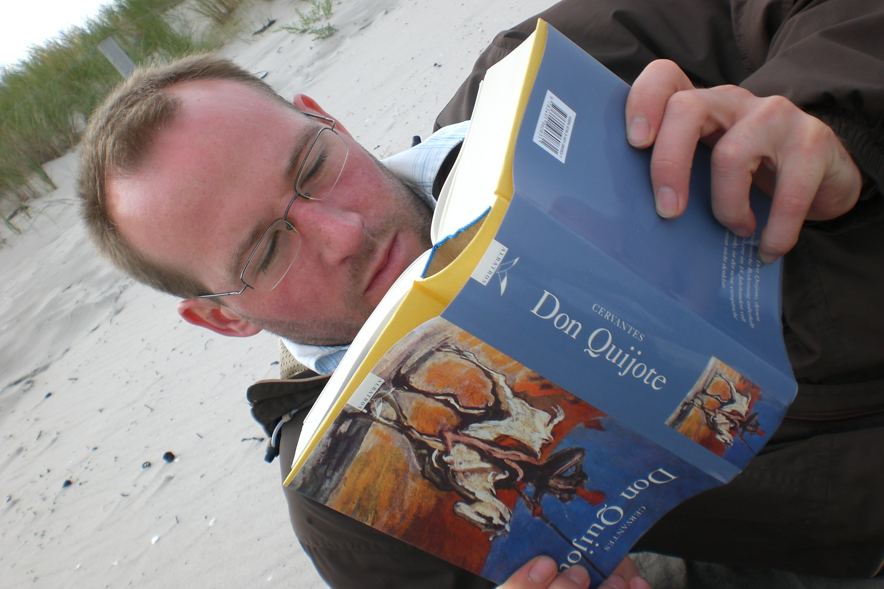 Martin Brinkmann (geschossen von Petra Zebrowski im Sommer 2008)